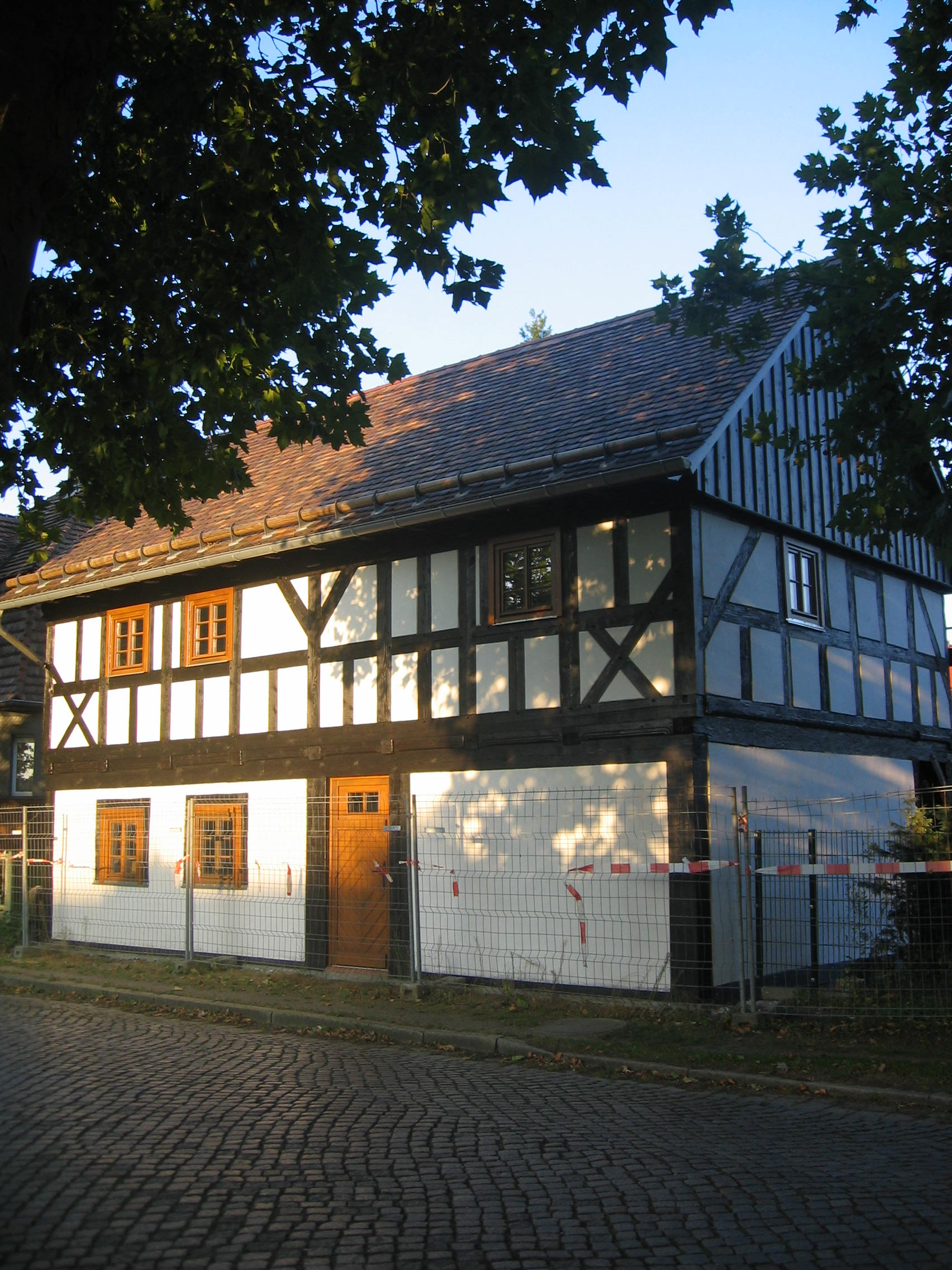 Ältestes Haus in der Stadt Ruhland, erbaut 1672, nach Restauration; Dresdener Straße 35, Ruhland; Denkmalschutz